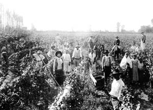 La foto muestra una escena típica de la provincia de San Juan, Argentina: la cosecha de uva (vendimia). Esta corresponde a los primeros años del siglo XX.